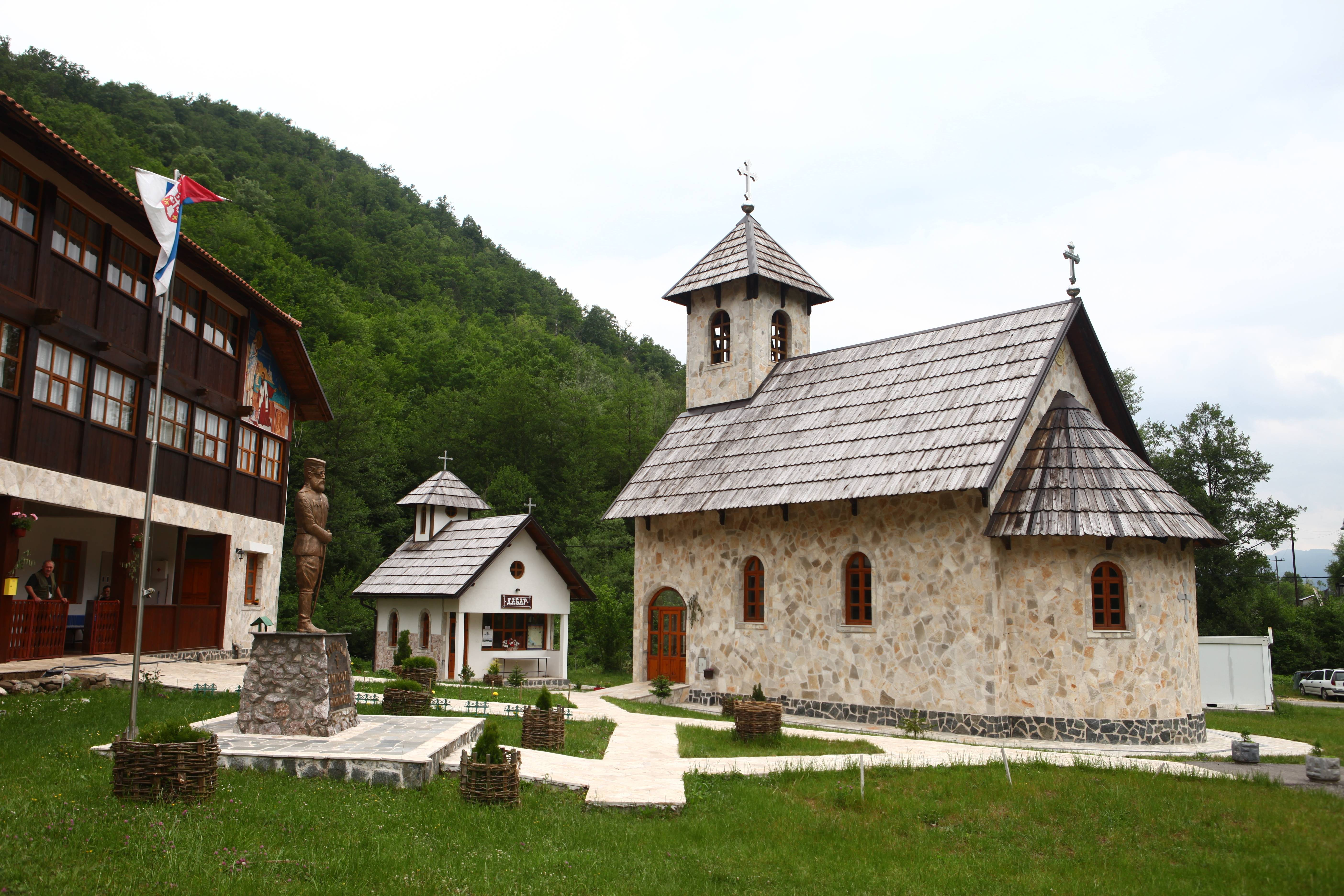 Mанастир Светог оца Николаја у Добрунској Ријеци.